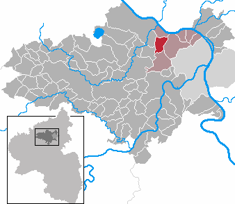 Kettig in Rhineland-Palatinate - district Mayen-Koblenz